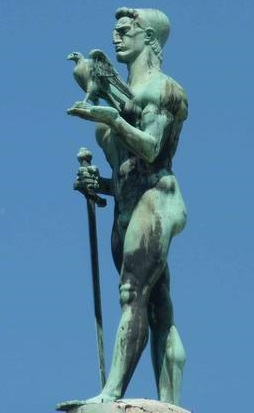 Gegë: Pamje e monumentit